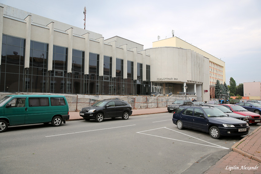 Гомель. Канцэртная зала